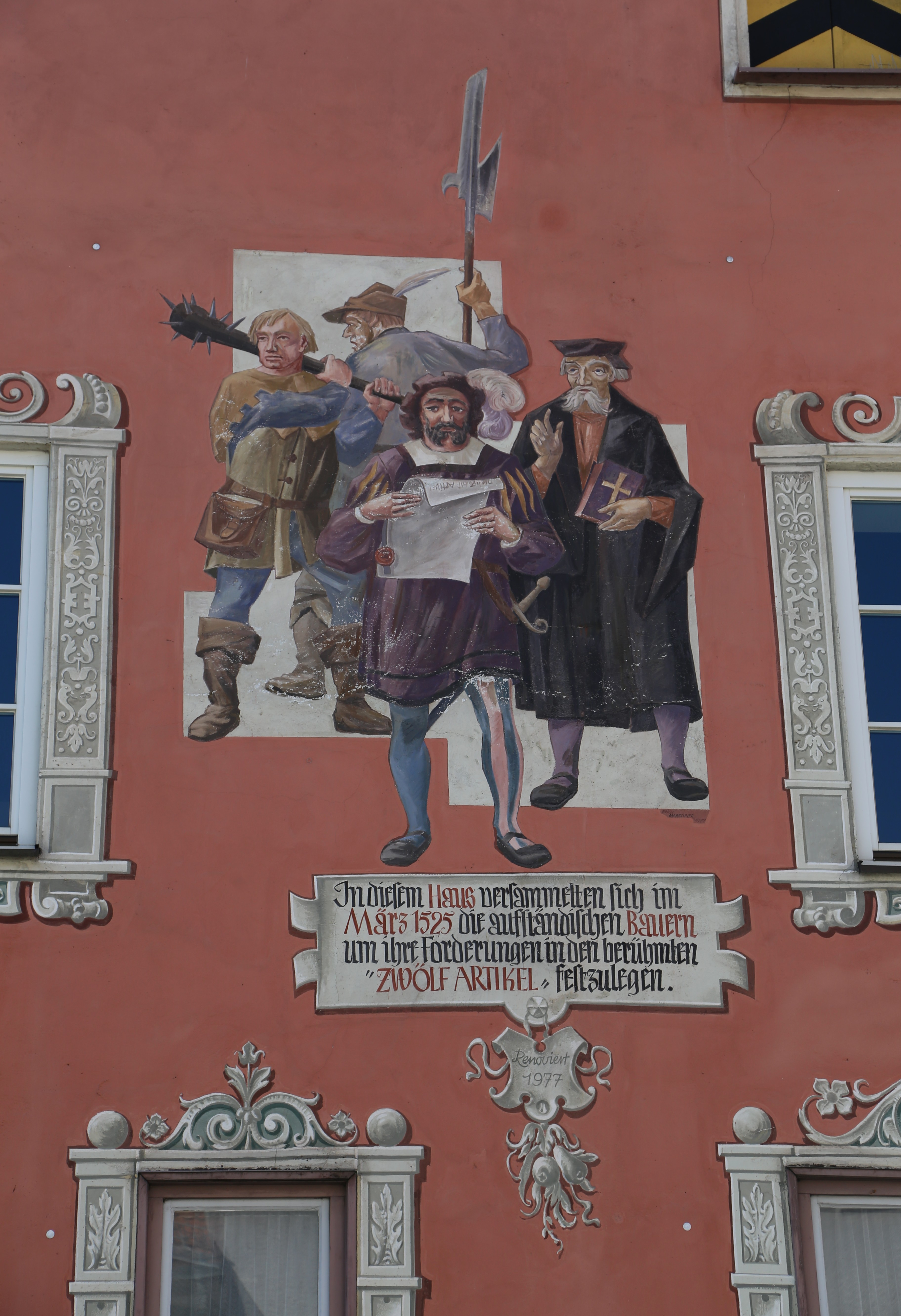 Weinmarkt 15, Kreuzstraße 10, Memmingen; Ehemaliges Kramerzunfthaus, im Kern 15. Jahrhundert, freistehendes, dreigeschossiges Satteldachhaus mit Blendgliederung und Arkaden an der Westseite; mit Kreuzstraße 10